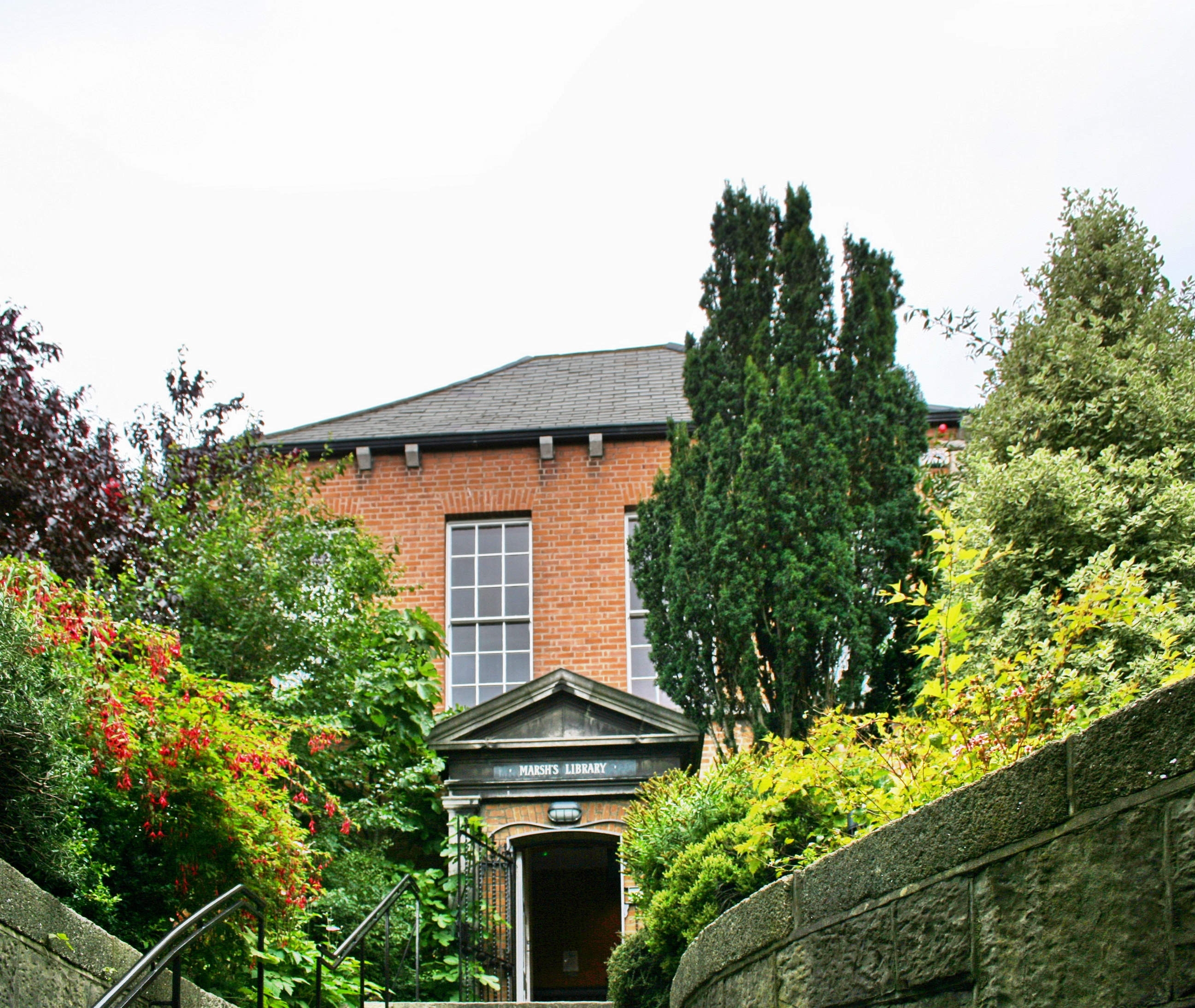 La biblioteca pública más antigua de Irlanda